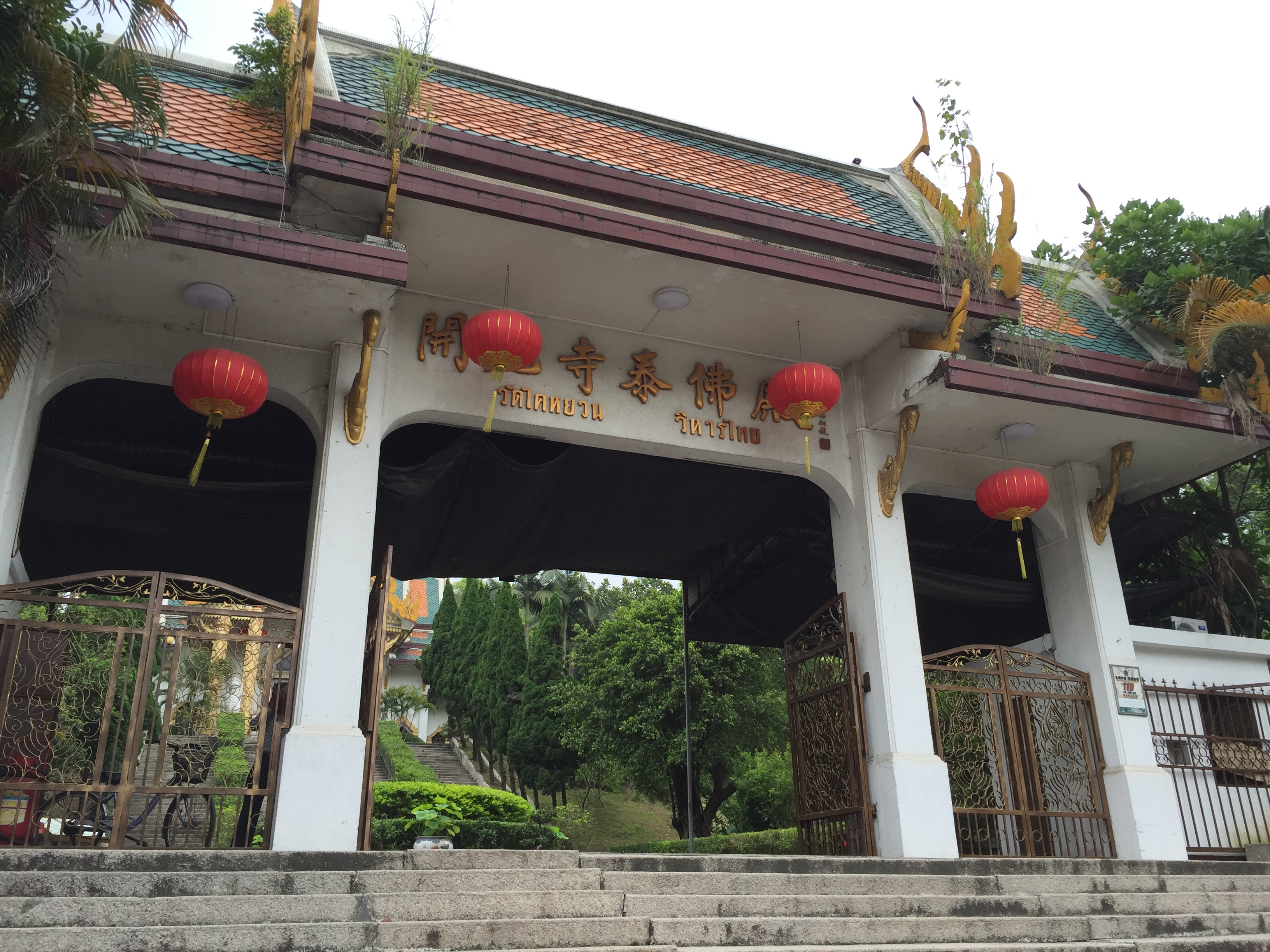 中文（中国大陆）: 开元寺泰佛殿